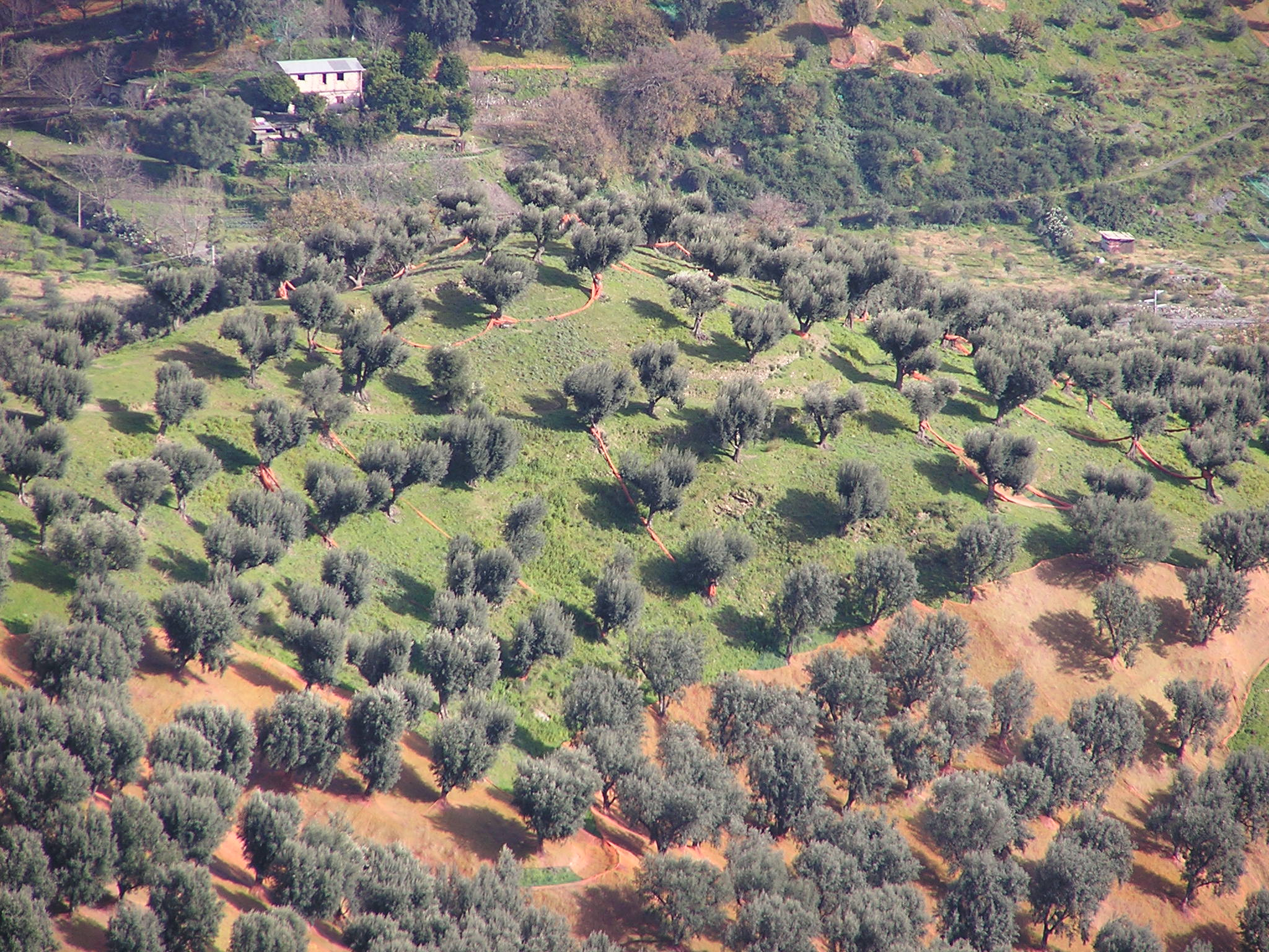 Olivenernte